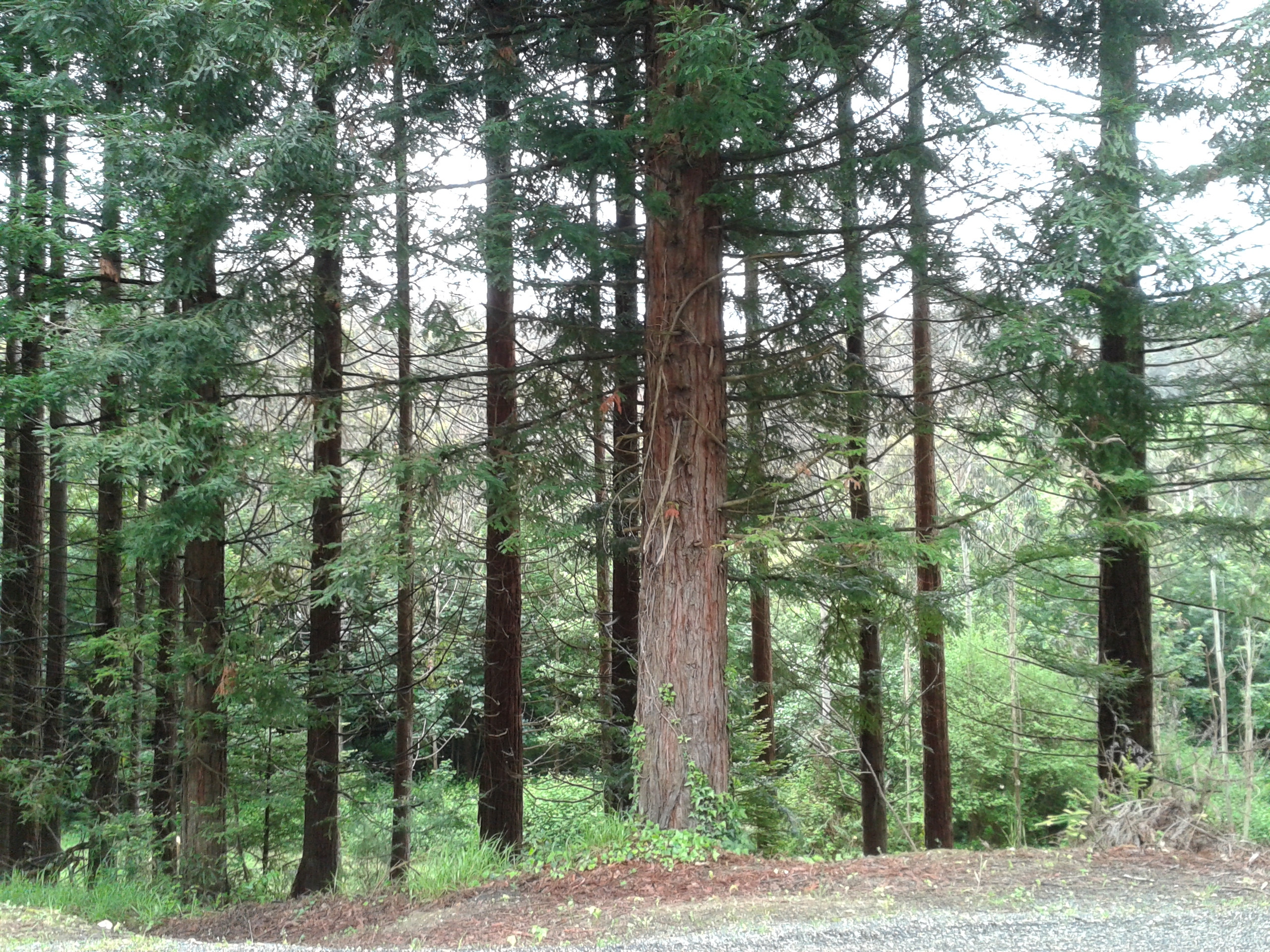 Plantación experimental de Fontao, Foz